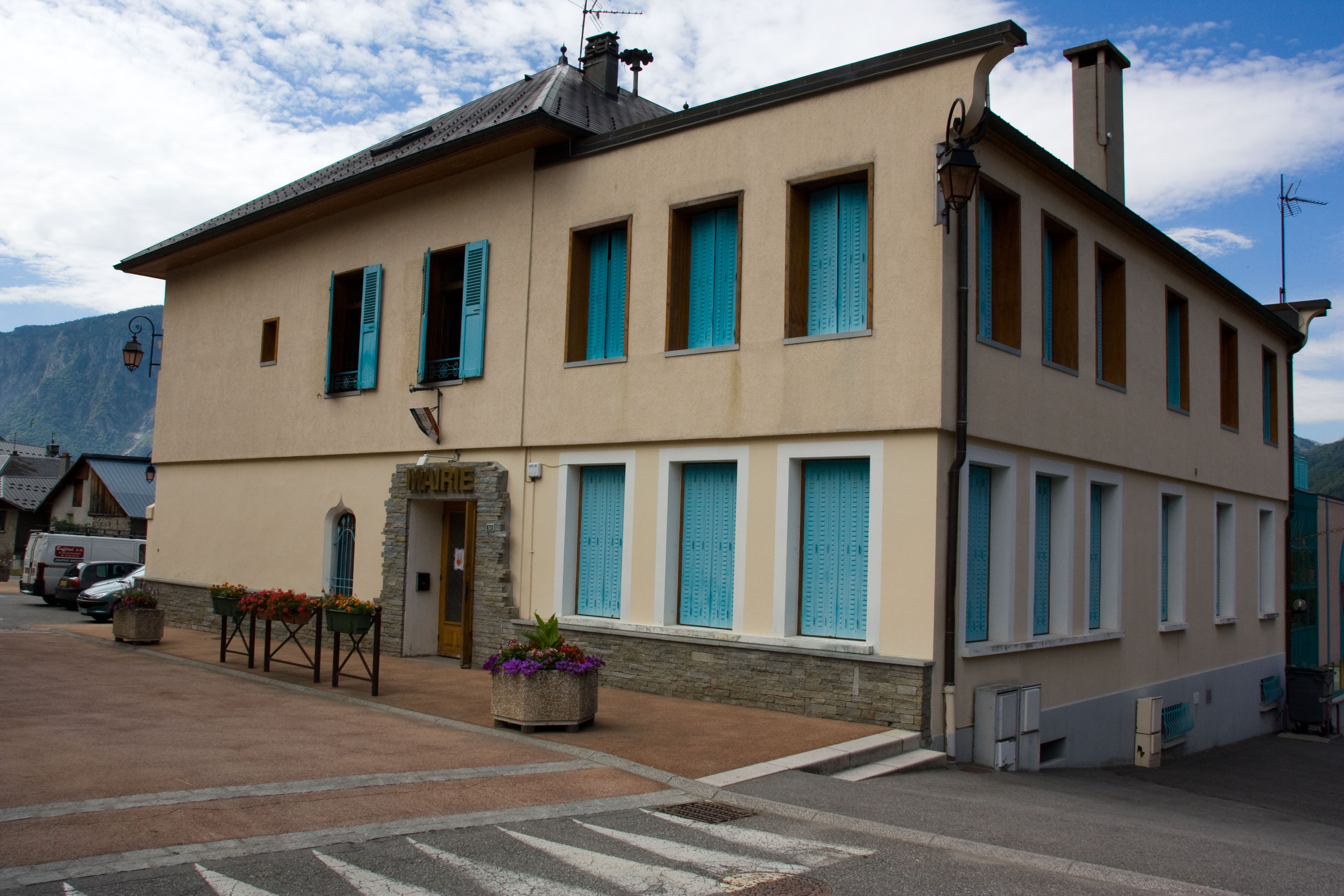 Saint-Avre, Savoie, France Mairie de Saint-Avre